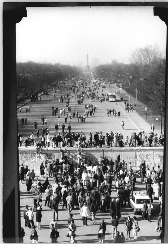 ADN-ZB Hirschberger 21.2.90-Berlin: Solch ein Gewimmel ist zur Zeit beiderseits der Mauer zu sehen, wenn man von der Plattform des Brandenburger Tores auf die Stadt schaut. Am Ende der Strasse des 17. Juni die Siegessäule.